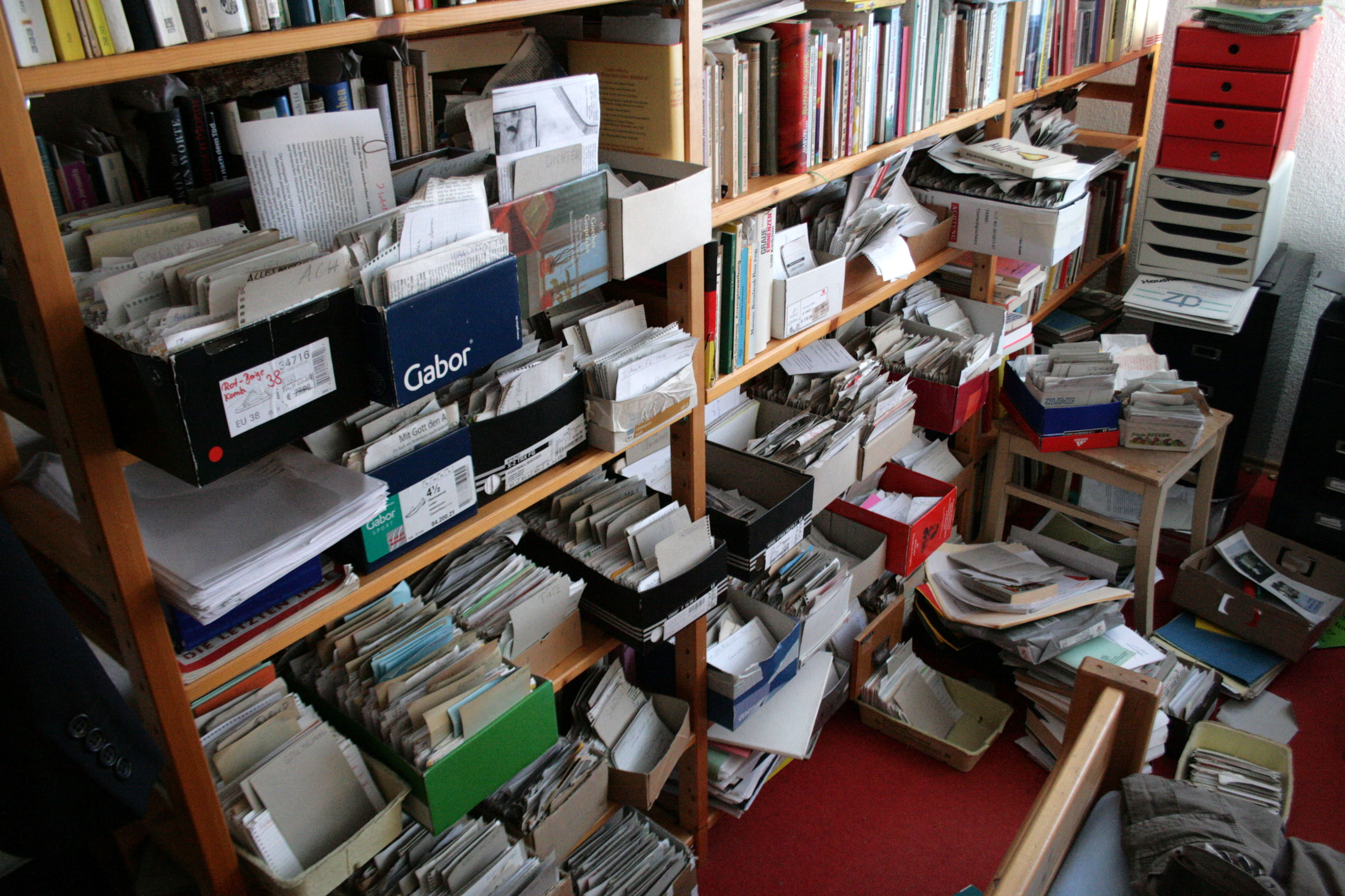 Zettelkasten